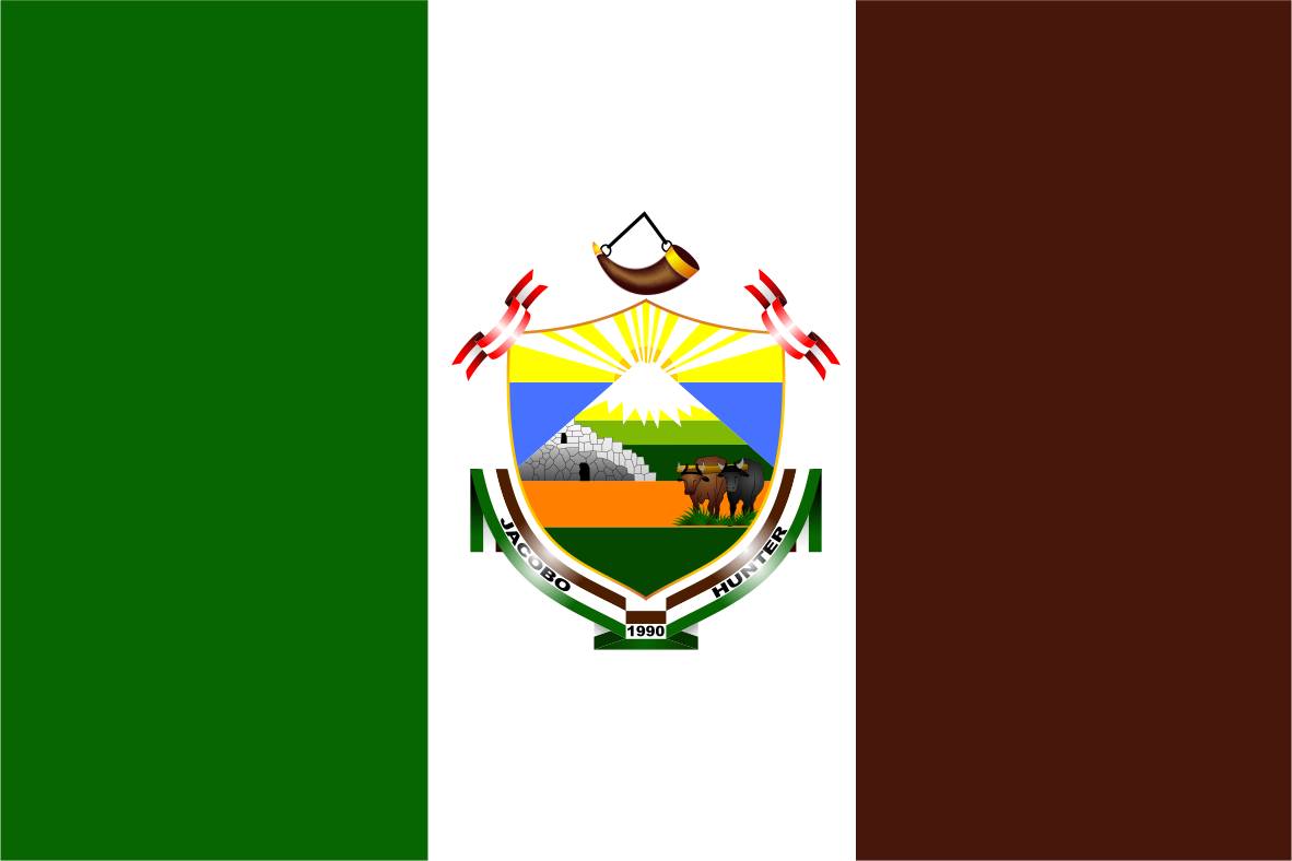 Distrito de Hunter